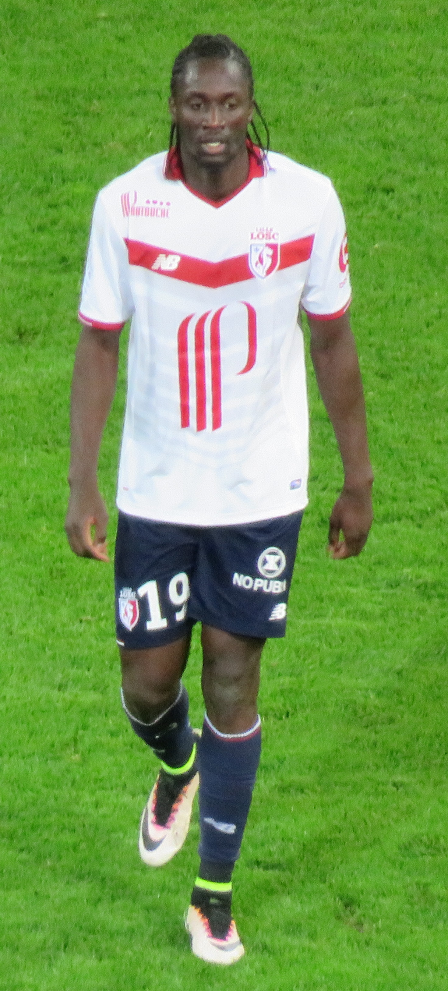 Eder lors de la première mi-temps du match entre Lille et Lyon le 18 novembre 2016